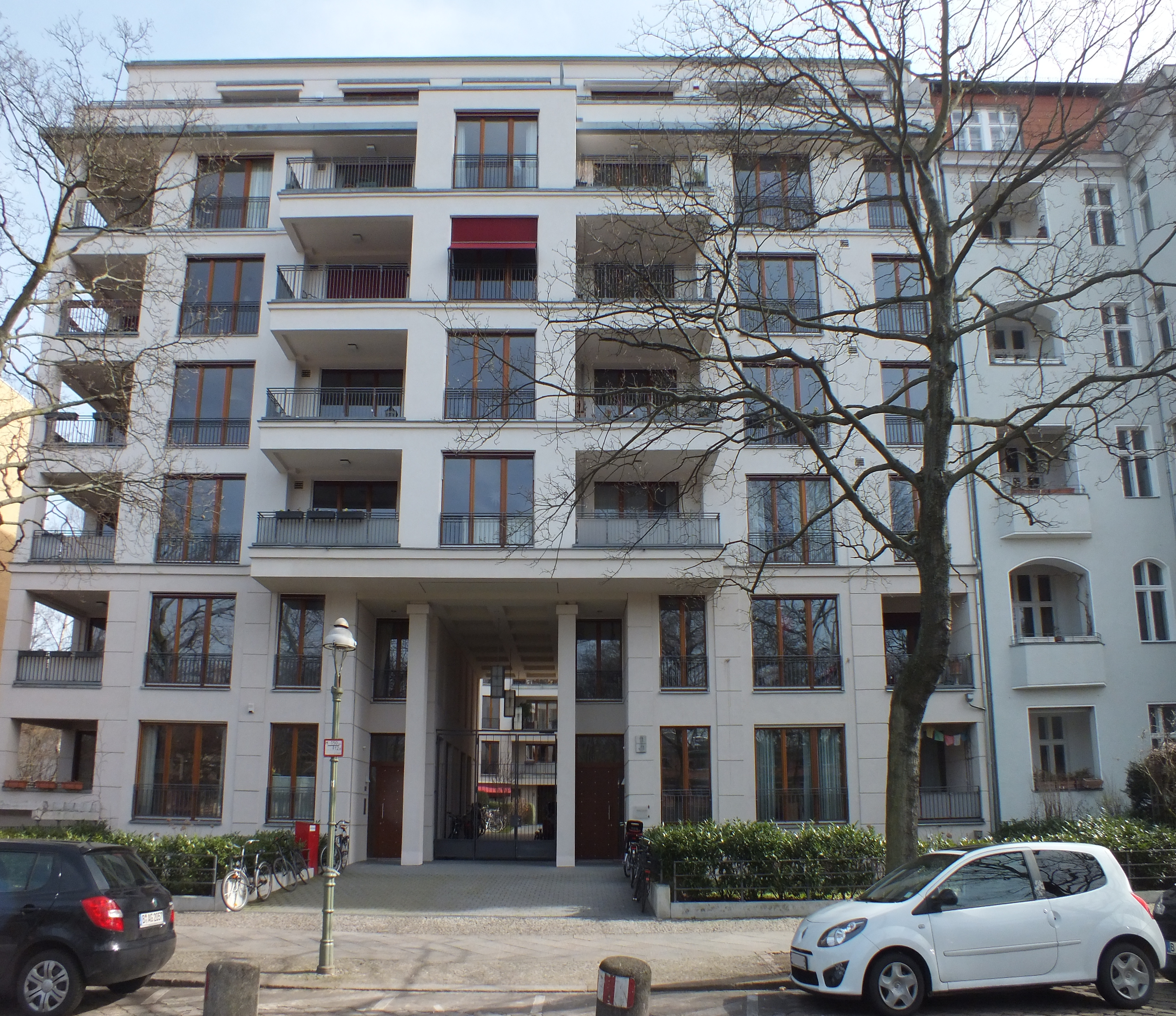 Fontanepromenade 12/13 in Kreuzberg